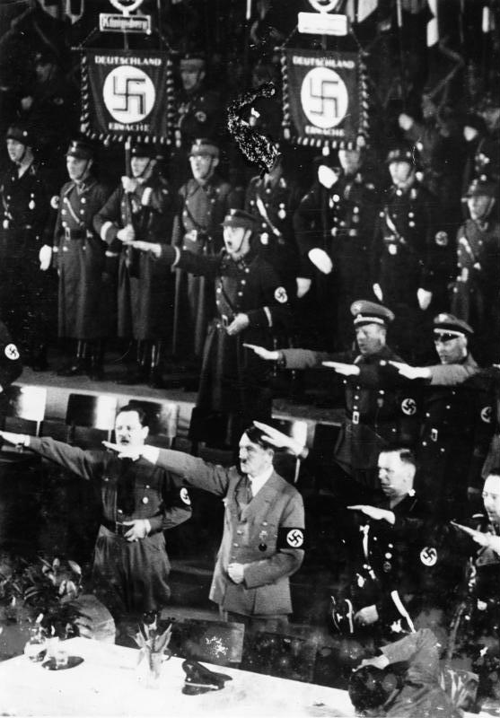 Königsberg, Adolf Hitler Der Führer in Königsberg. Auch auf der vierten Wahlkundgebung im Schlaeterhaus in Königsberg zeigte sich wieder erneut die einmütige Geschlossenheit, mit der das deutsche Volk hinter seinem Führer steht. U.Bz.: den Führer nach der Rede beim Deutschlandlied, links von ihm Oberpräsident Koch, der Gauleiter von Ostpreussen. Scherl Bilderdienst, Berlin, 19.3.1936 Abgebildete Personen: Hitler, Adolf: Reichskanzler, Deutschland Koch, Erich: Reichskommissar für die Ukraine, Gauleiter von Ostpreußen, Deutschland